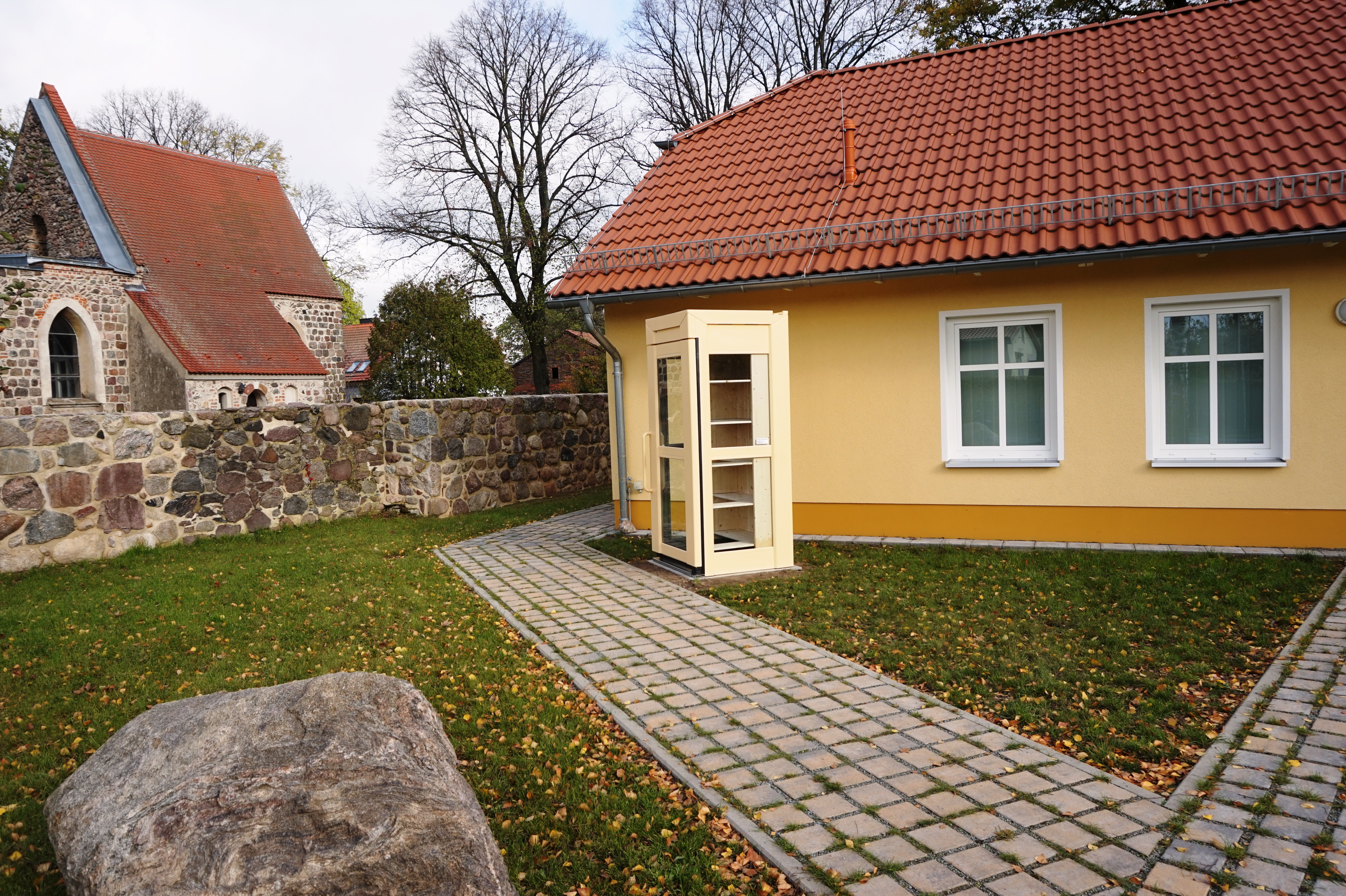 Kirche von 1266 und Dorfgemeinschaftshaus von 2016 mit Büchertelefonzelle auf dem Dorfanger Birkholz (Bernau bei Berlin)